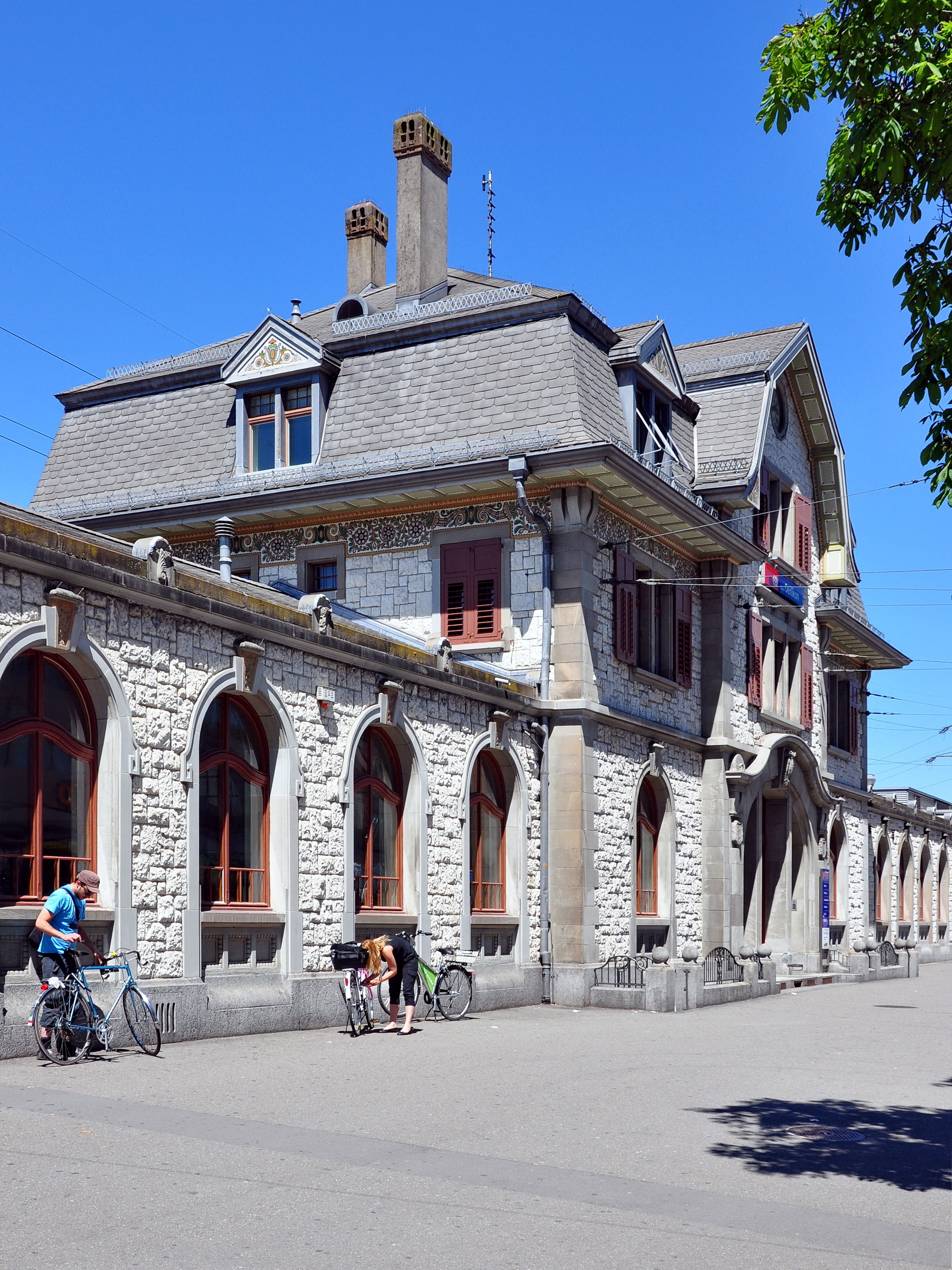 Zürich-Oerlikon train station (Switzerland)